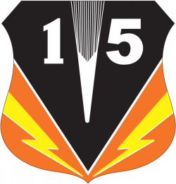 Gambar ini adalah Lambang Skuadron Udara 15, Koops AU II